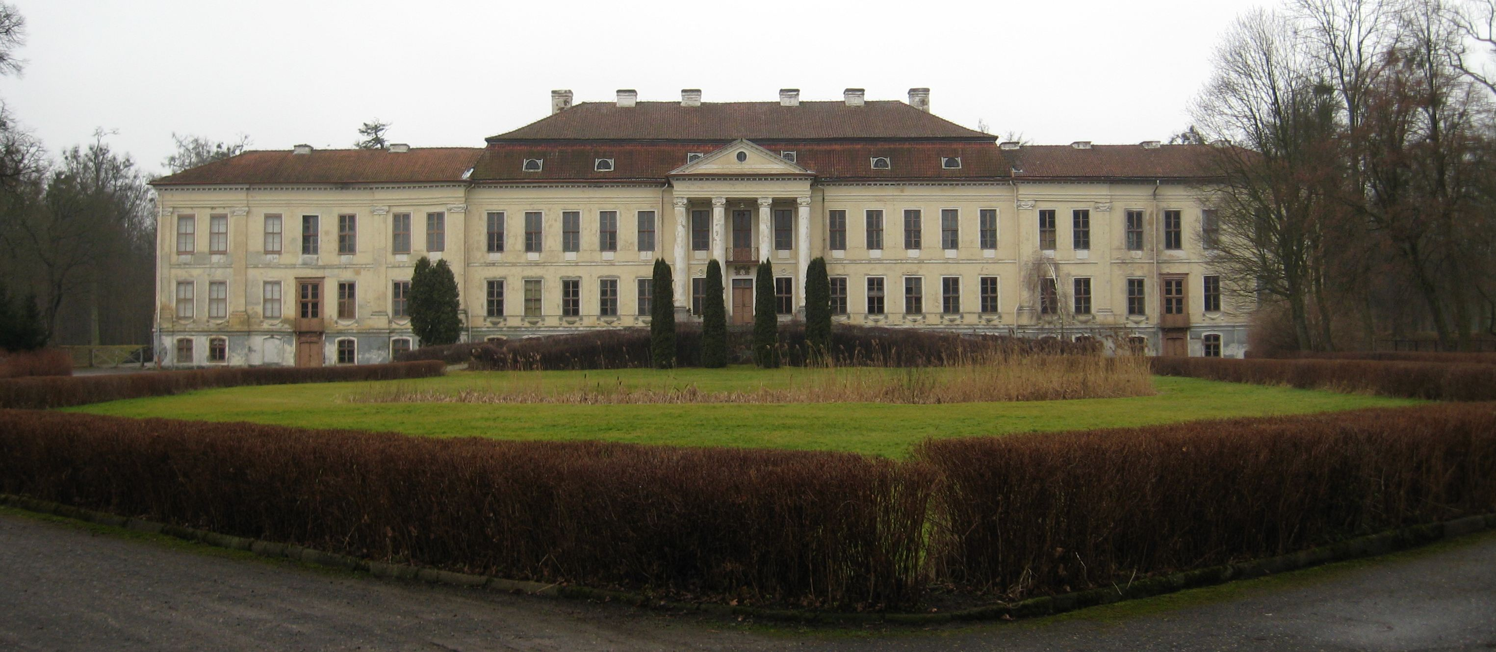 Palace w Drogosze (Groß Wolfsdorf) in Poland